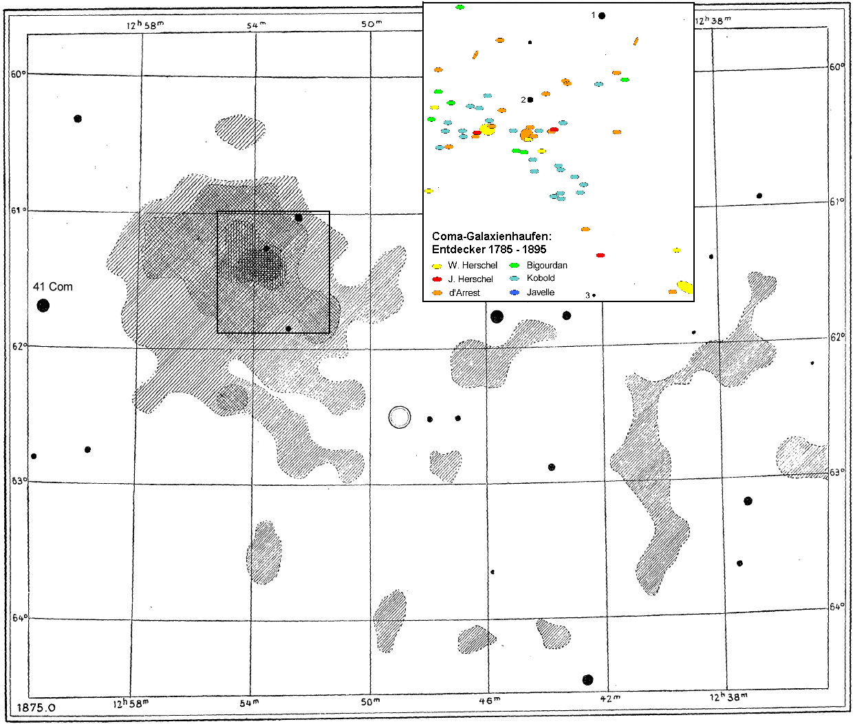 Coma-Galaxienhaufen: Galaxiendichte nach einer langbelichteten Himmelsfotografie von Max Wolf 1901 (Scan aus "Weltall u.Menschheit" Band 3, Dt.Verlagshaus, Berlin/Leiptig~1903) Inlay: Vergleich des Zentralteils mit den visuellen Entdeckungen der einzelnen Galaxien von W.Herschel bis zu etwa 1895 Bearb. Geof 04:37, 25. Jul 2005 (CEST)